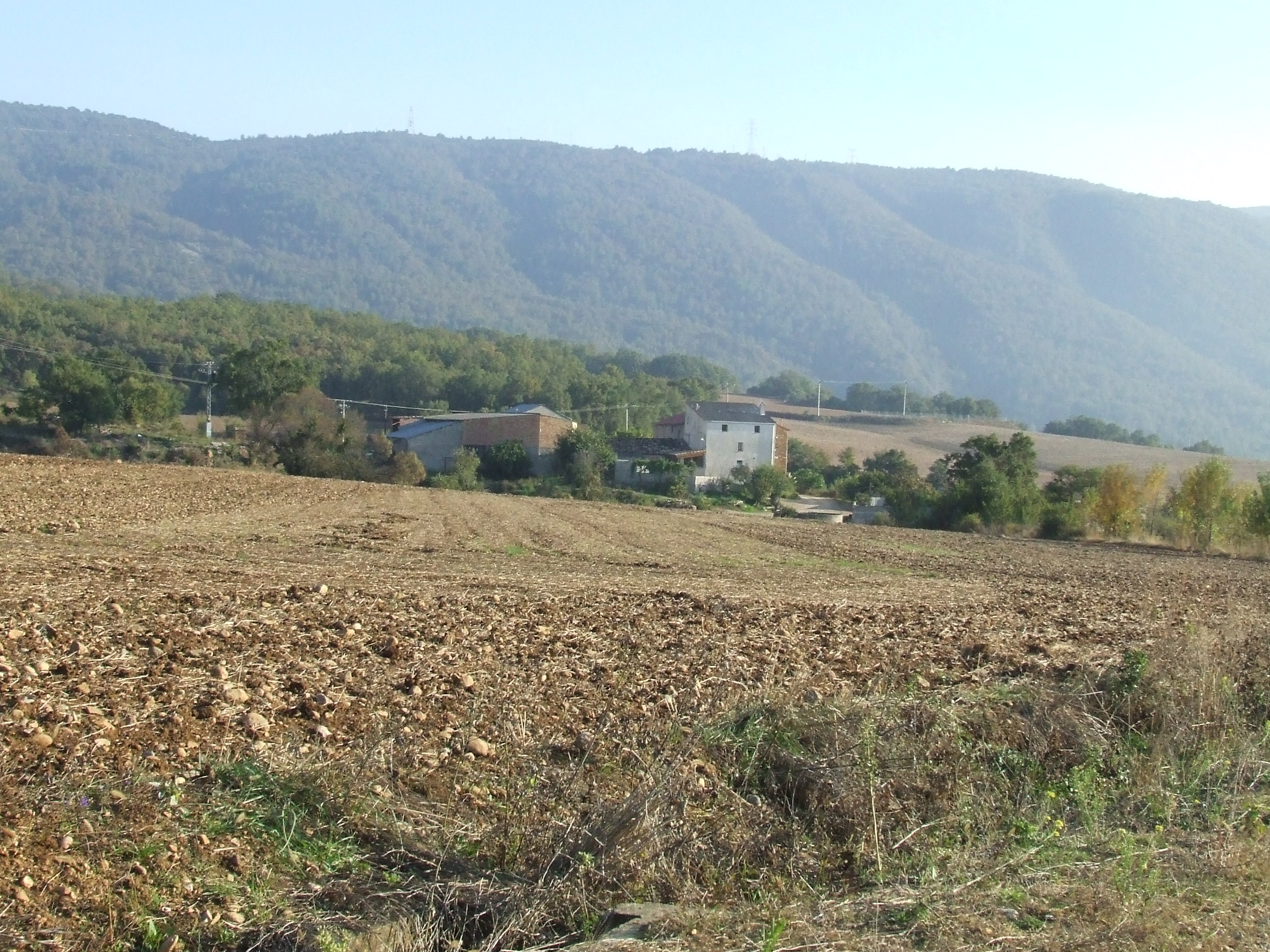 El poble de Gramenet, de Benavent de la Conca (Isona i Conca Dellà, Pallars Jussà)